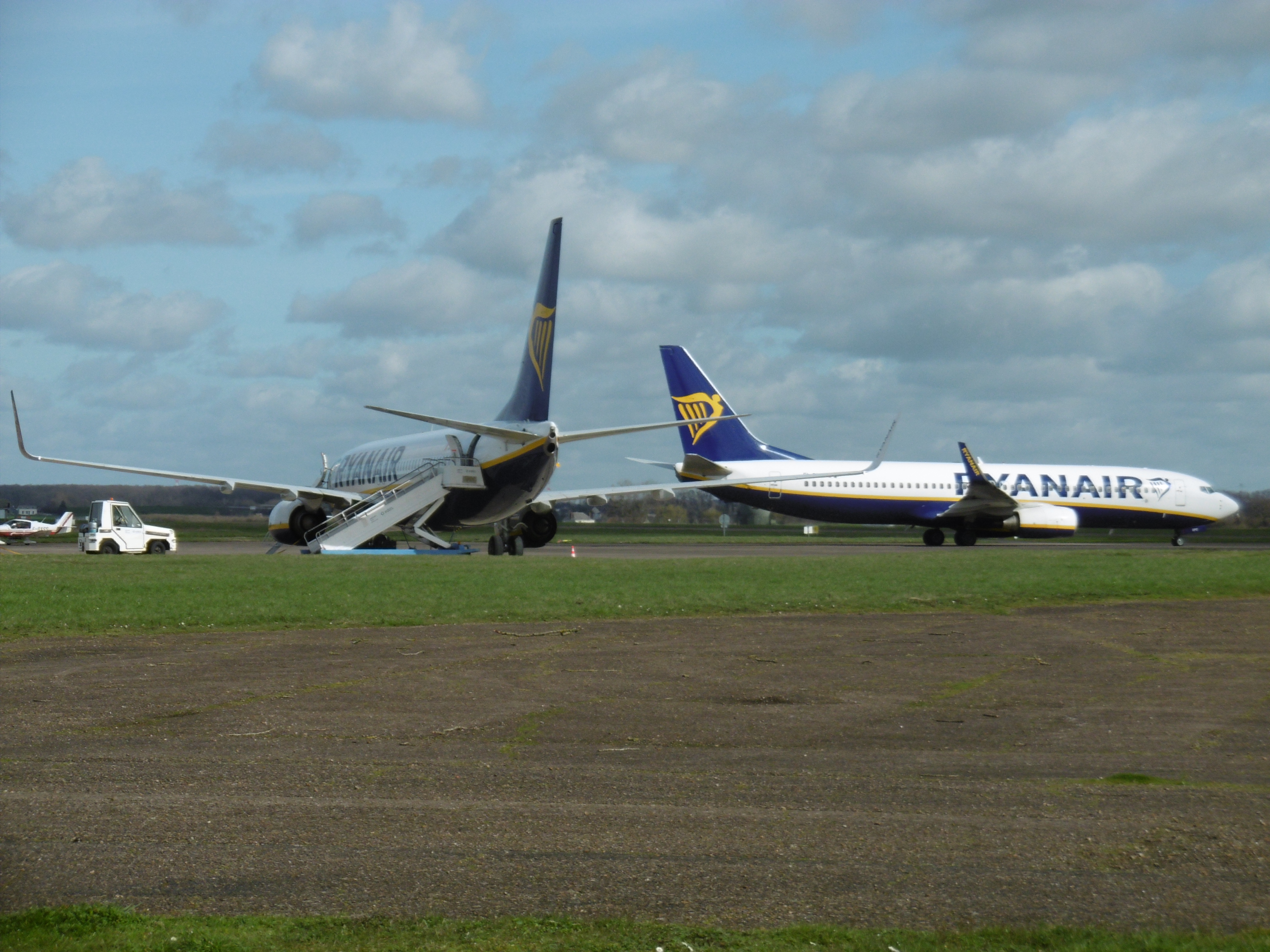 2 Boeing 737-800 sur le tarmac de l'aéroport.